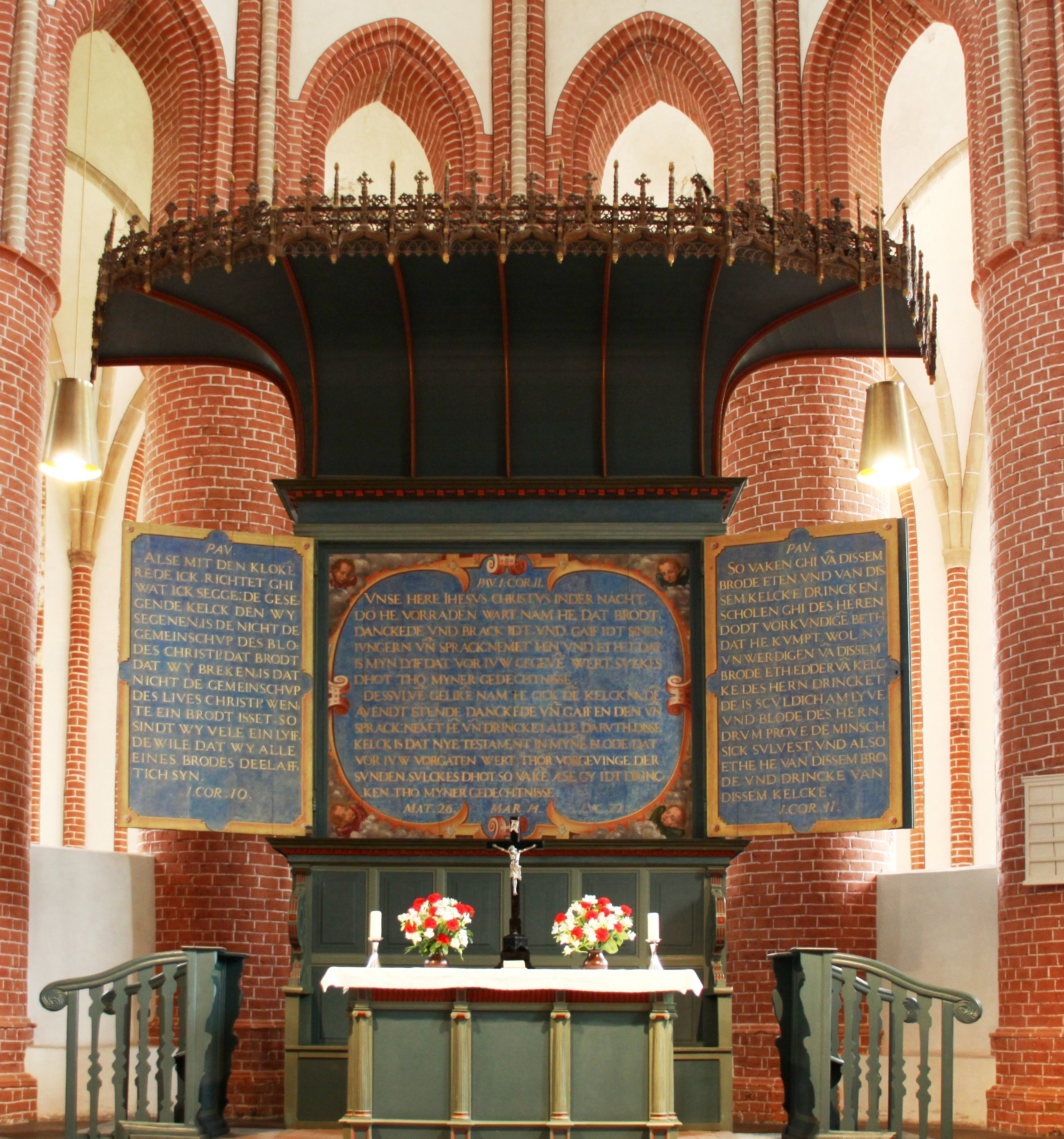 Altar der Ludgerikirche